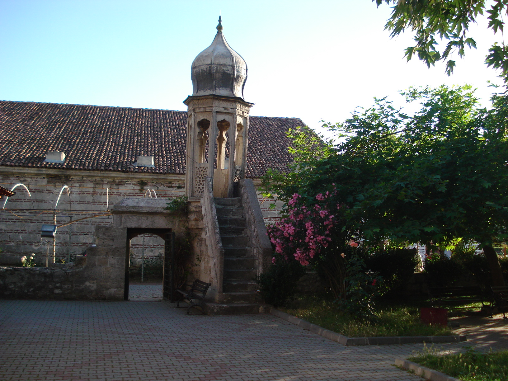 Sokullu Mehmet Paşa Mosque is built in Büyükçekmece, İstanbul by Mimar Sinan